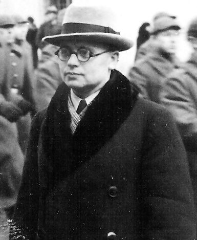 Vilnius 1939